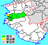 和歌山県有田郡の範囲（1.湯浅町 2.広川町 3.有田川町）